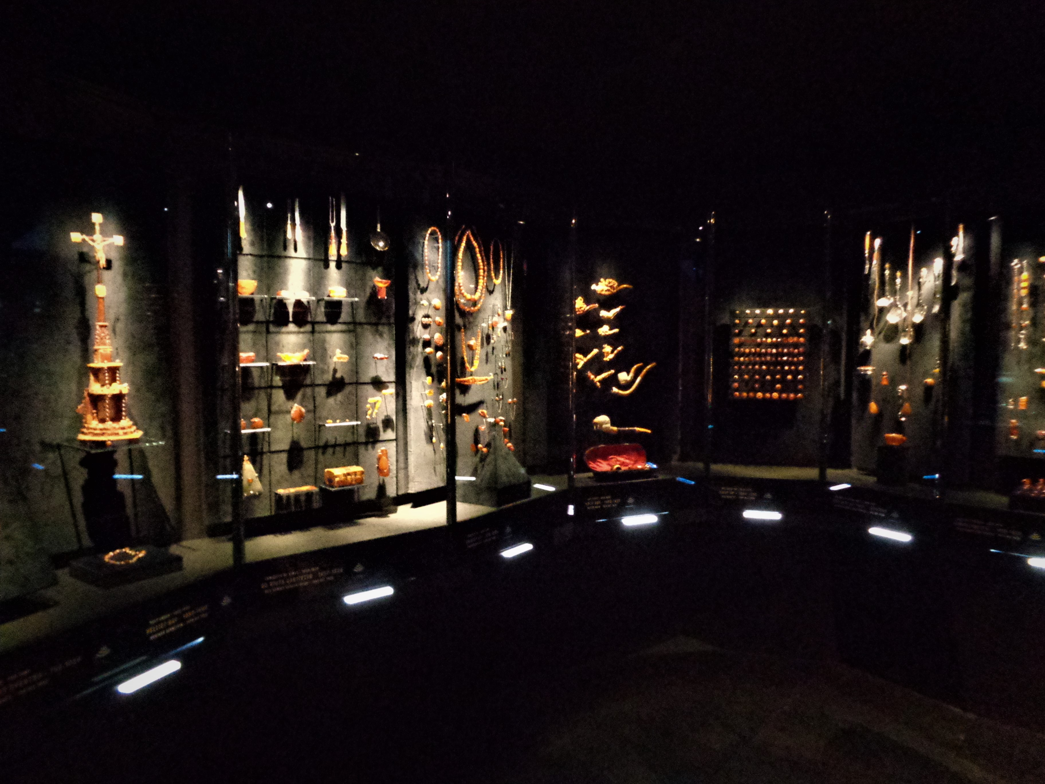 Bernsteinsammlung, ausgestellt im Tirpitz-Museum in Blåvand.